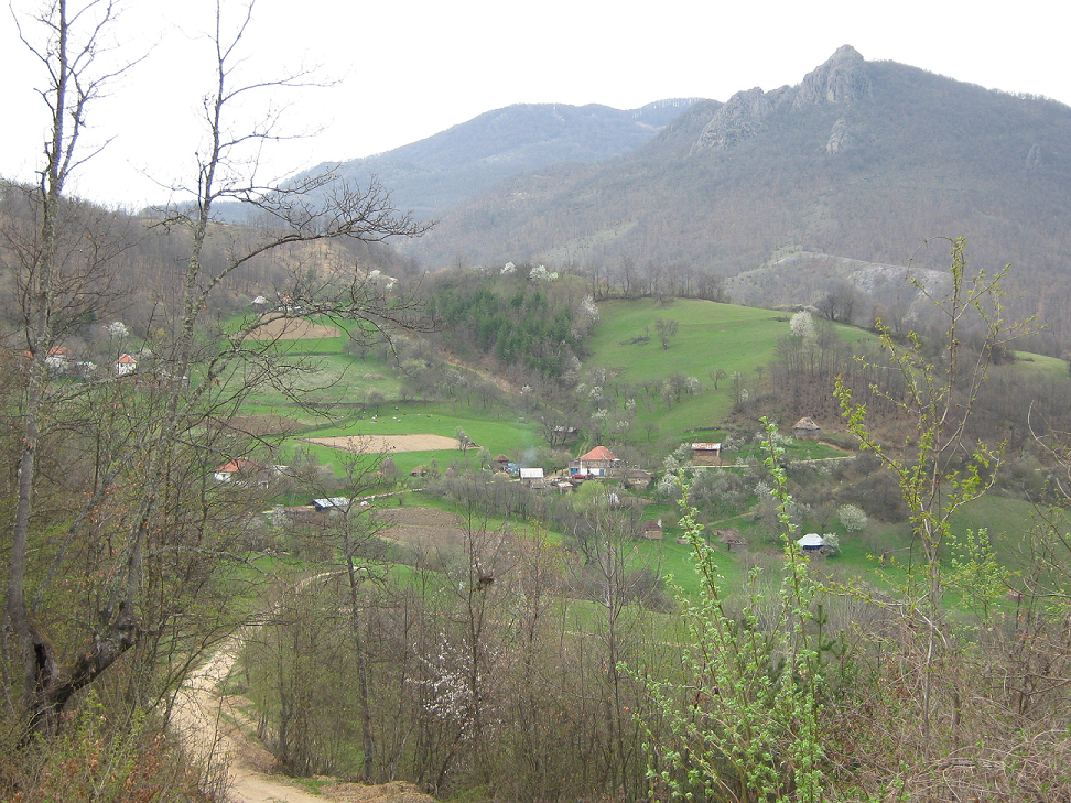 Slikano aprila 2009. godine, na ulasku u selo od groblja.